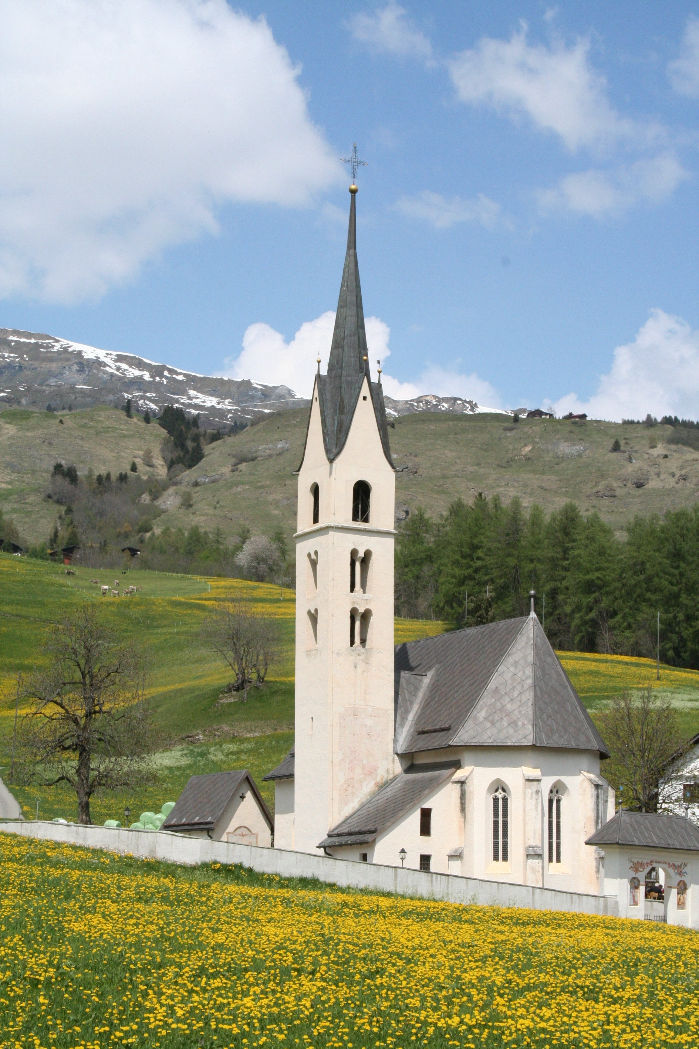 Marienkirche von Degen